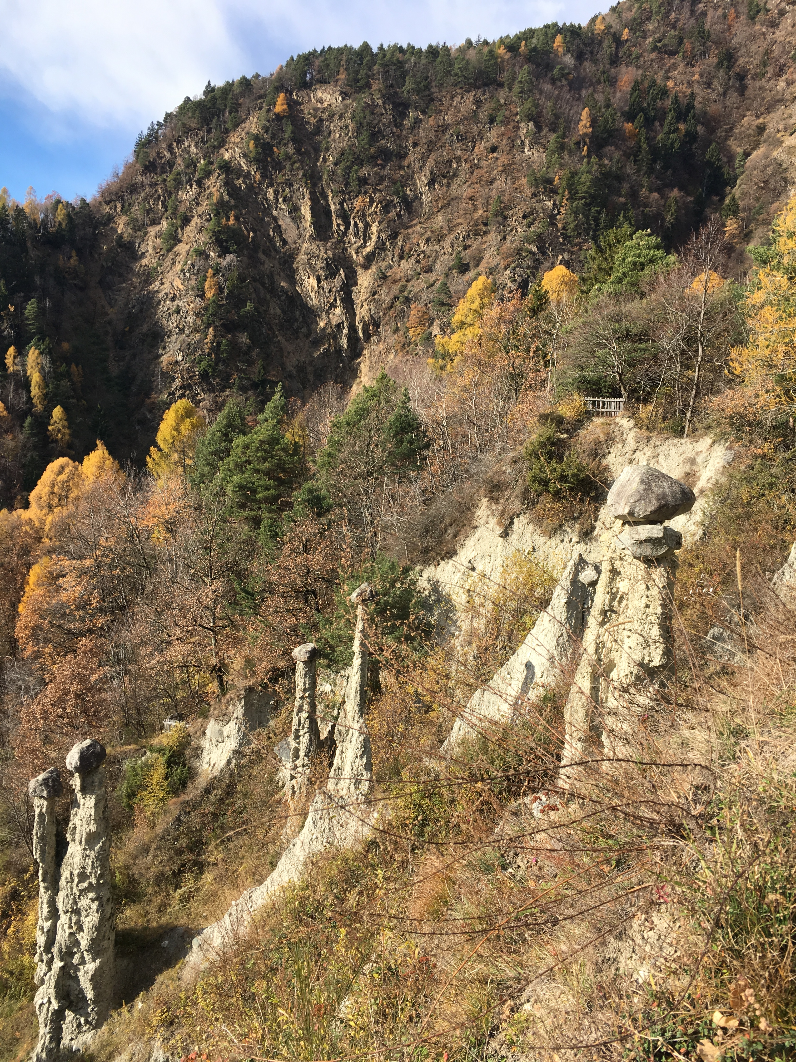 Riserva naturale Piramidi di Postalesio (Q47508625)